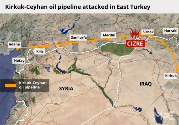 Kərkük-Ceyhan neft kəməri